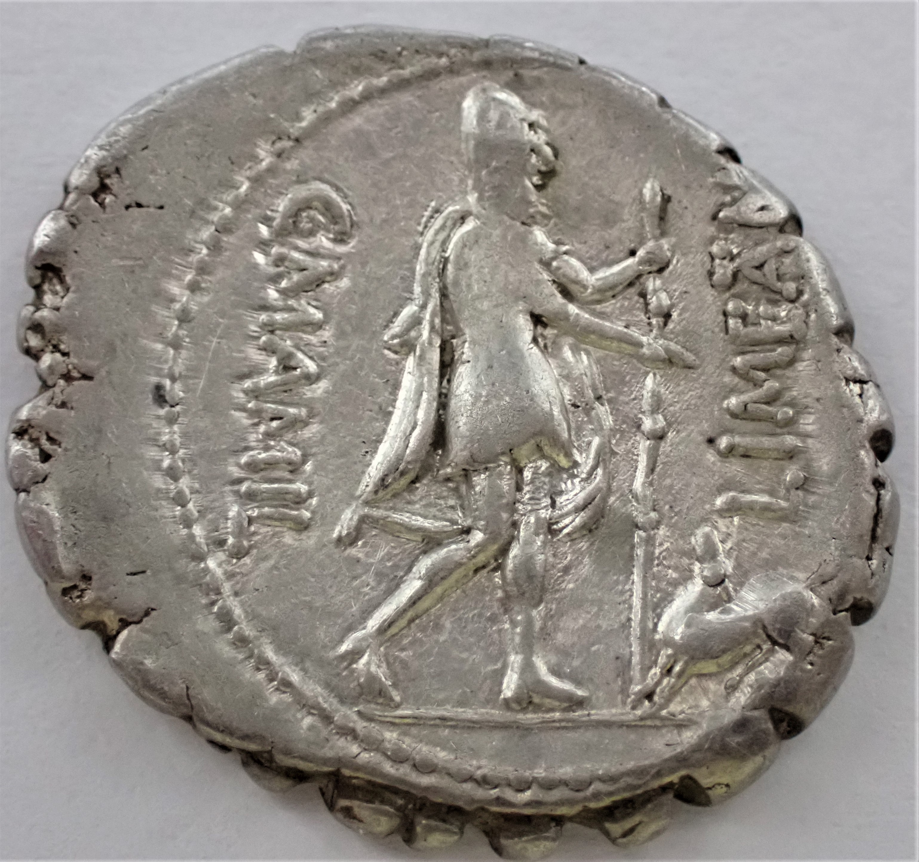 Odysseus wird von seinem Hund Argos begrüßt, Szene auf römischen Denar (Serratus), C. Mamilius Limetanus C.f., Rom, 82 vor Chr., in: Rainer Albert, Die Münzen der Römischen Republik, S. 155, Nr. 1253